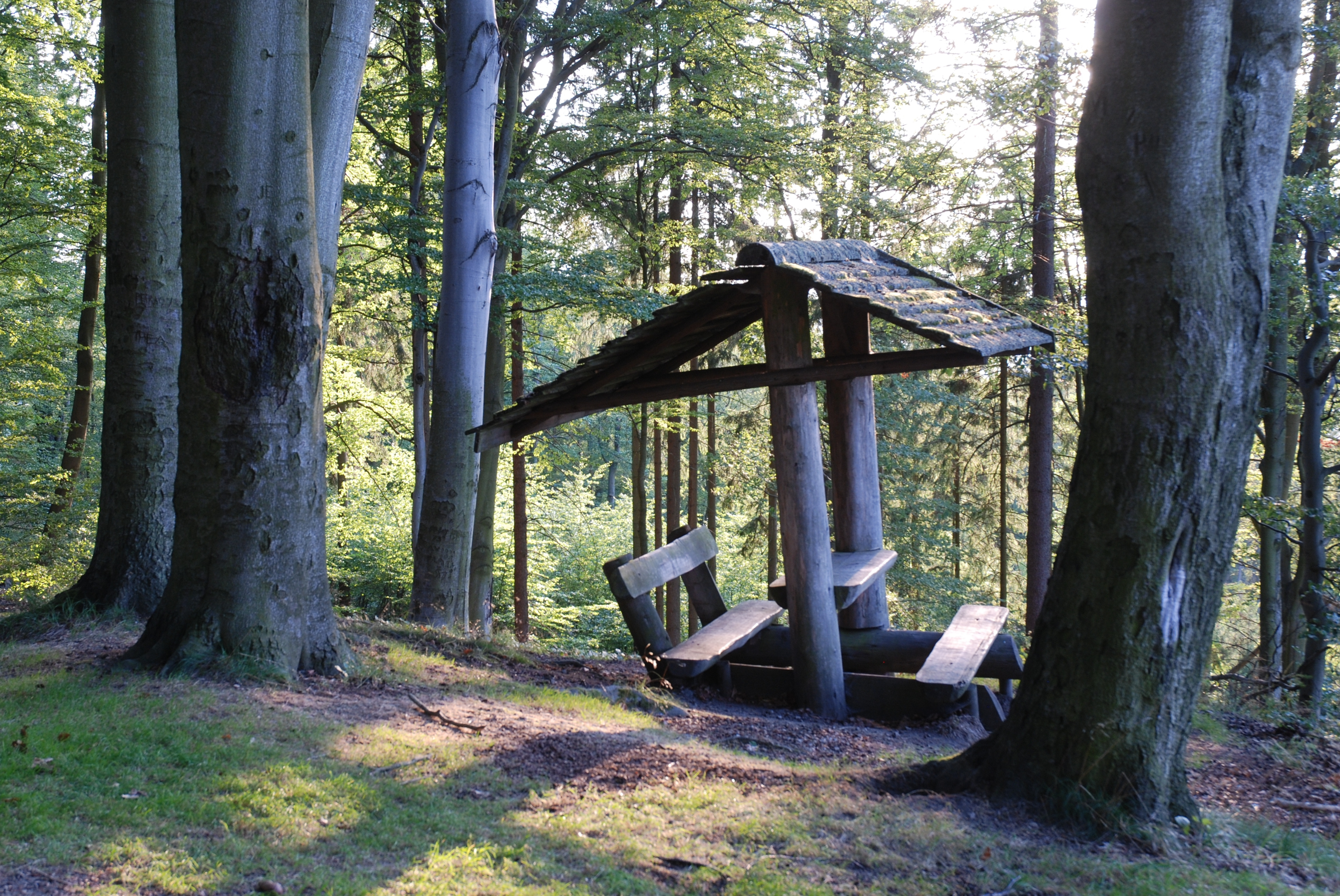 Vyhlídka Pod Ottovou výšinou v karlovarských lázeňských lesích